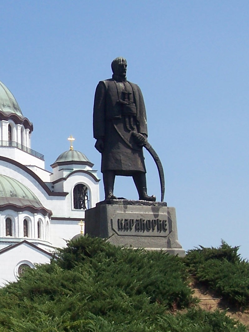 Памятник Георгию Карагеоргию в Белграде